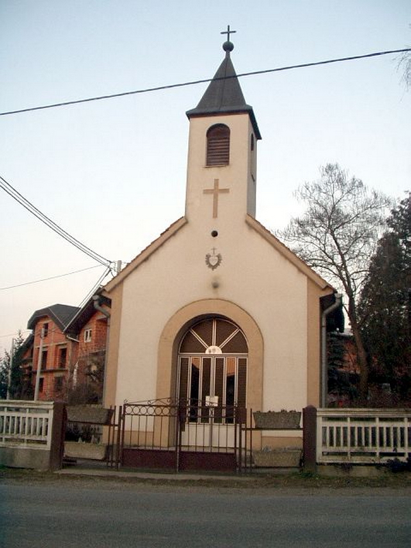 Kreča Ves - Kapelica